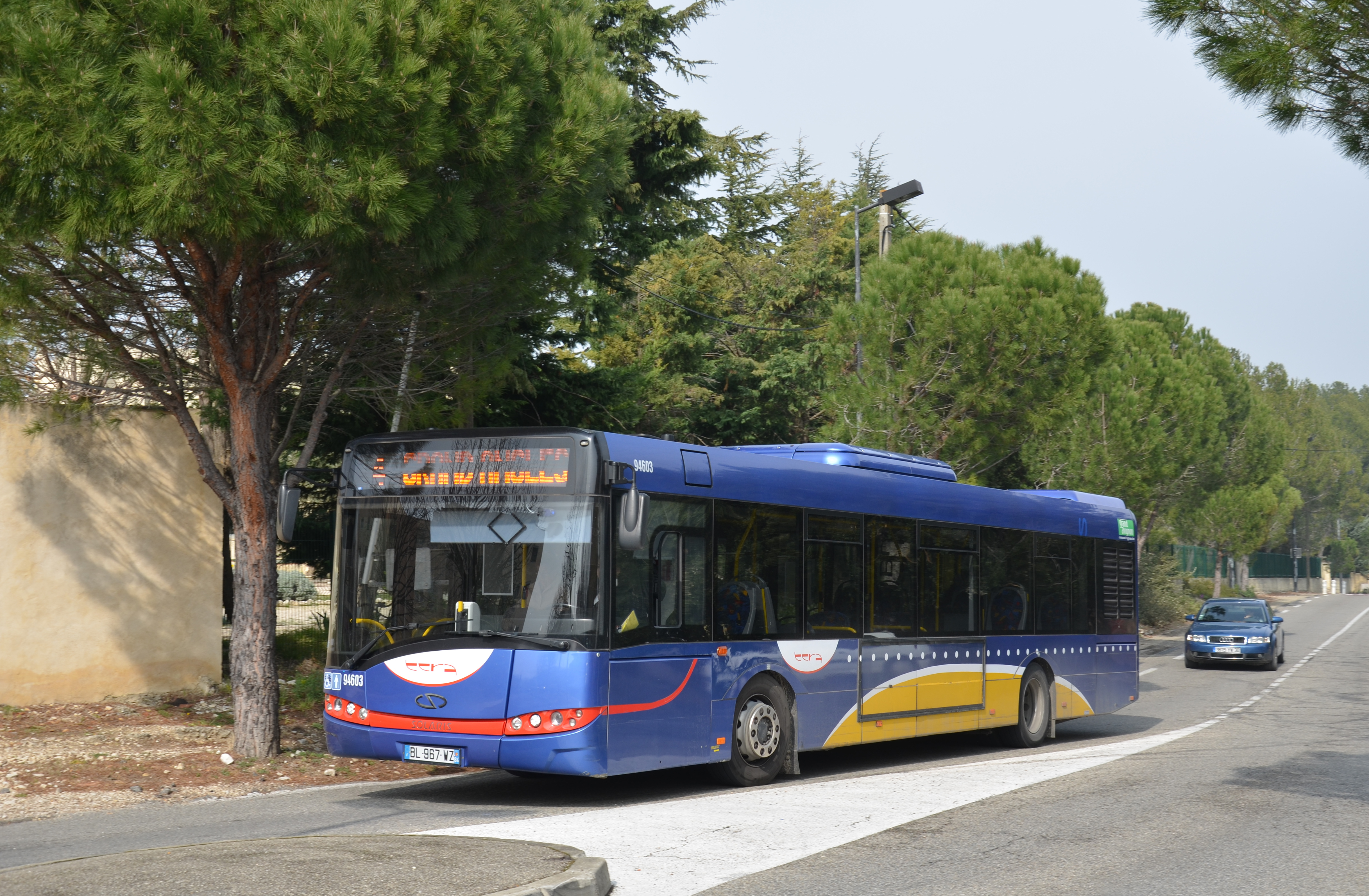 Solaris Urbino 12 n°94603 de la ligne 4 du réseau TCRA, approchant de l'arrêt Dinarelle.